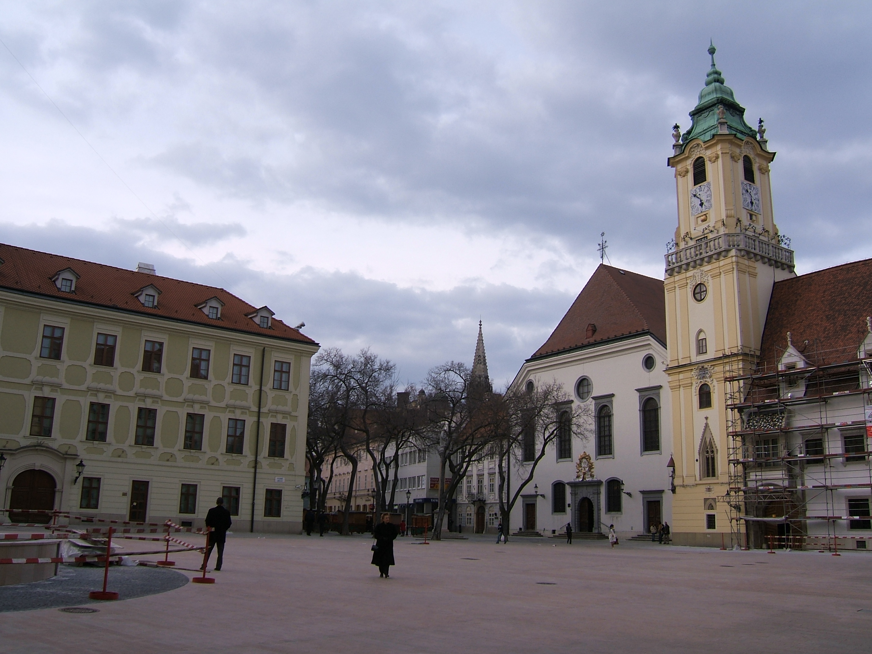 stare mesto (slovakia)